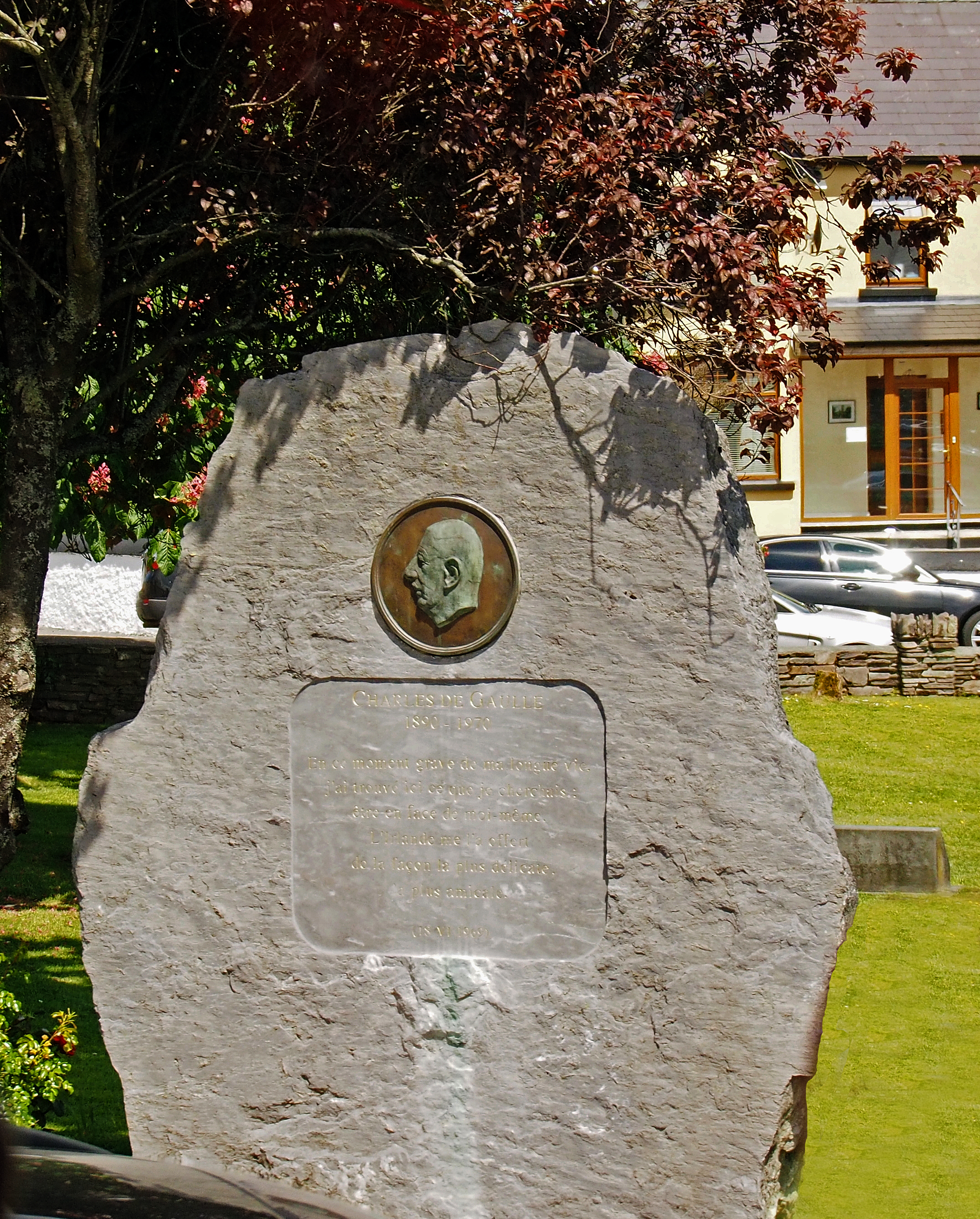 Denkmal für General De Gaulle anlässlich seines 13 tägigen Besuchs Mai 1969 in Sneem, County Kerry, Irland